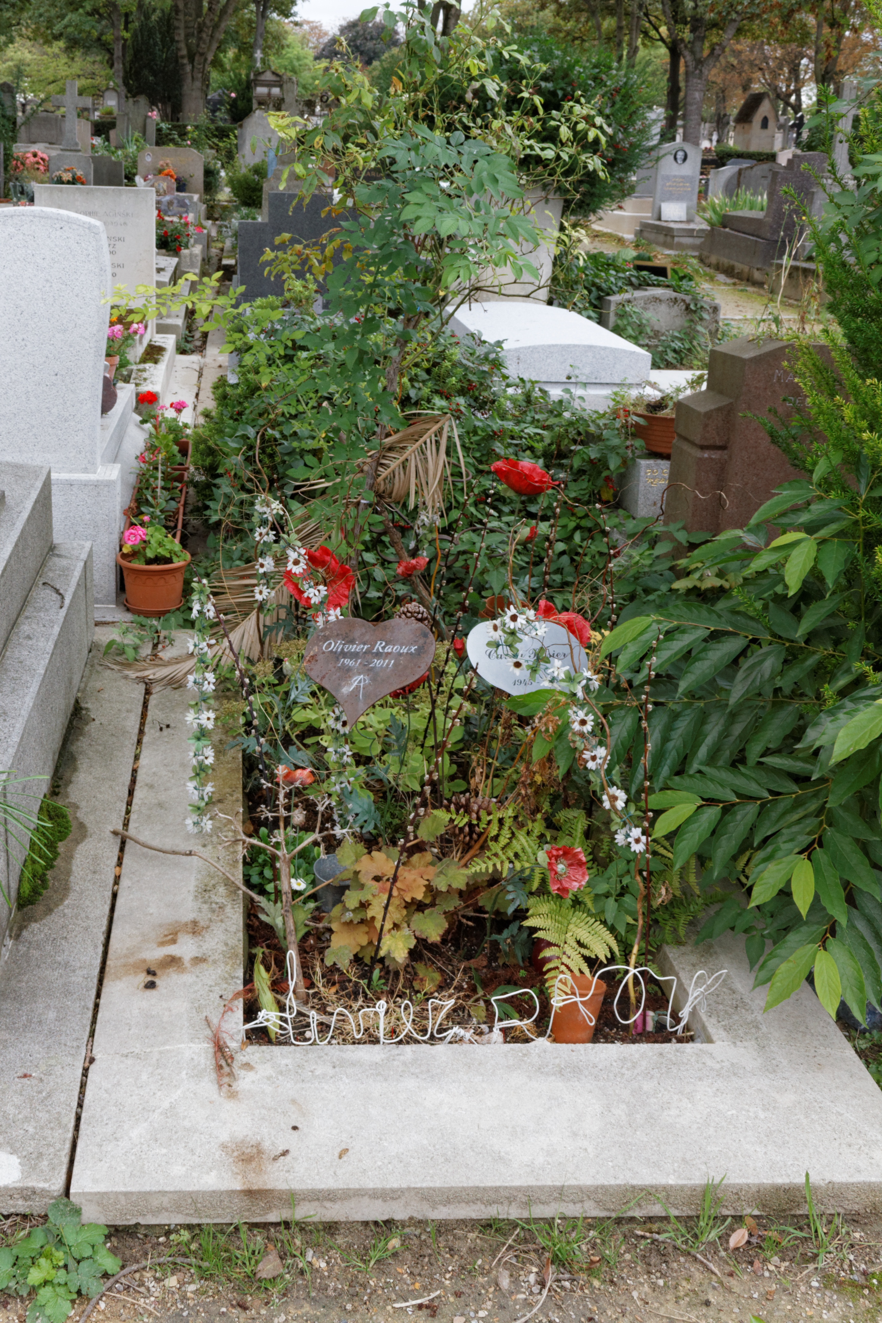 Vue d'ensemble